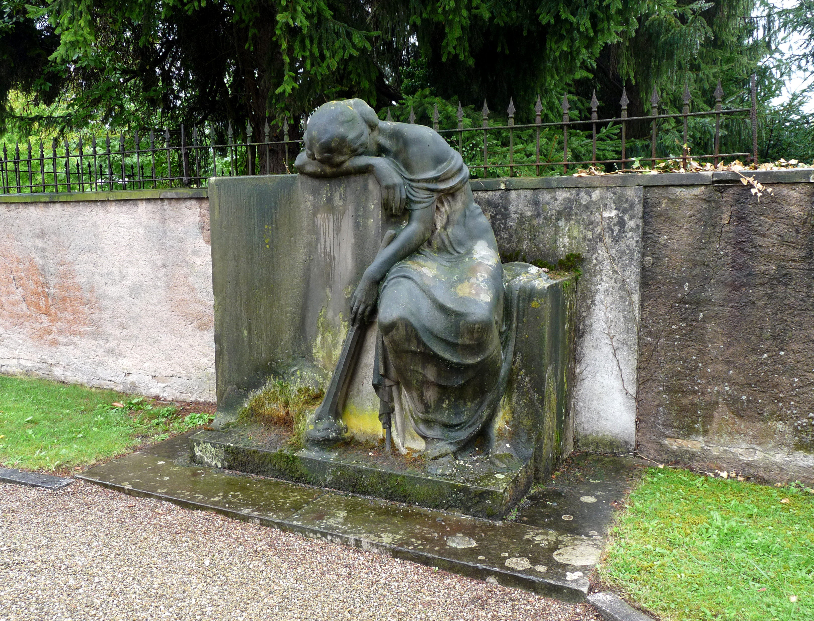 Vestige de l'ancien monument aux morts de la Robertsau, aujourd'hui visible au cimetière Saint-Louis (Strasbourg